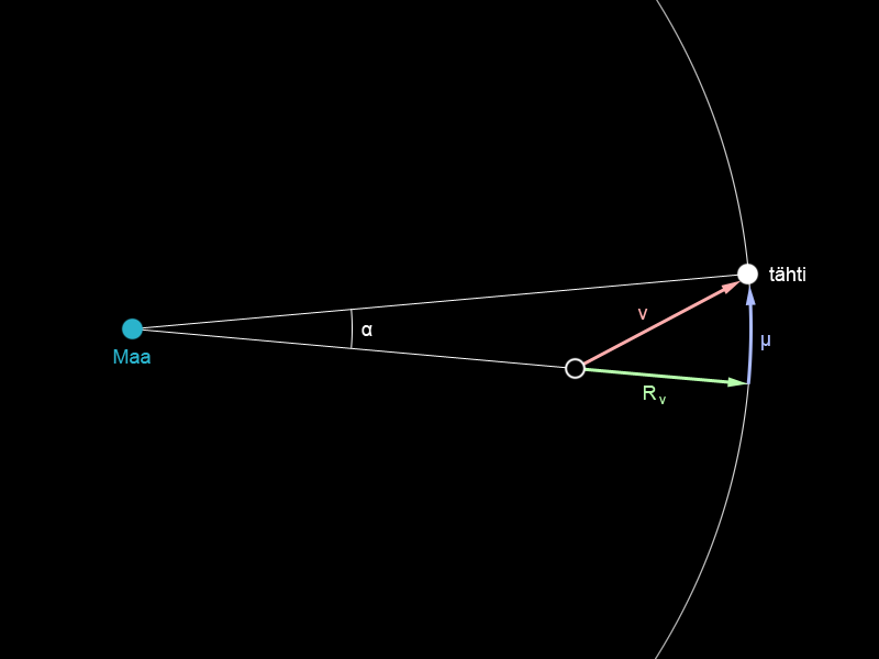 Kaavakuva tähden todellisen liikkeen eri komponenteista. Kun tähden sijainti taivaankannella muuttuu kulman α verran ajassa t, on sen ominaisliike tällöin μ. Tähden säteisliike on liikkeen Maan suuntainen komponentti, ja sitä merkitään tunnuksella Rv. Tähden kokonaisnopeus v voidaan laskea trigonometrian avulla, kun kaksi muuta suuretta tunnetaan mittausten perusteella.